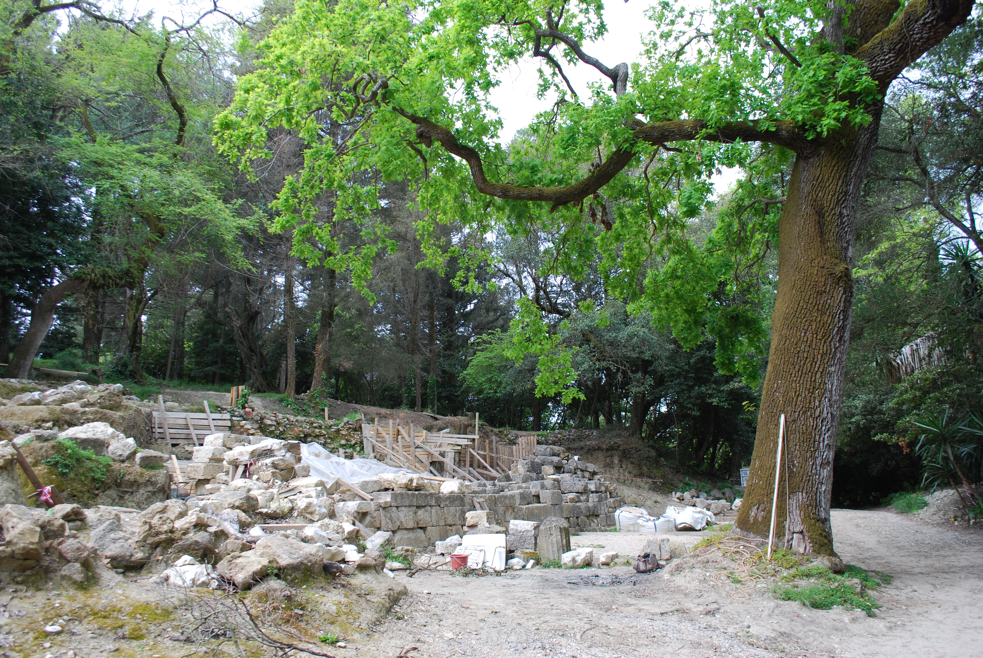 Vue du site archéologique de Paleopoli à Corfou.